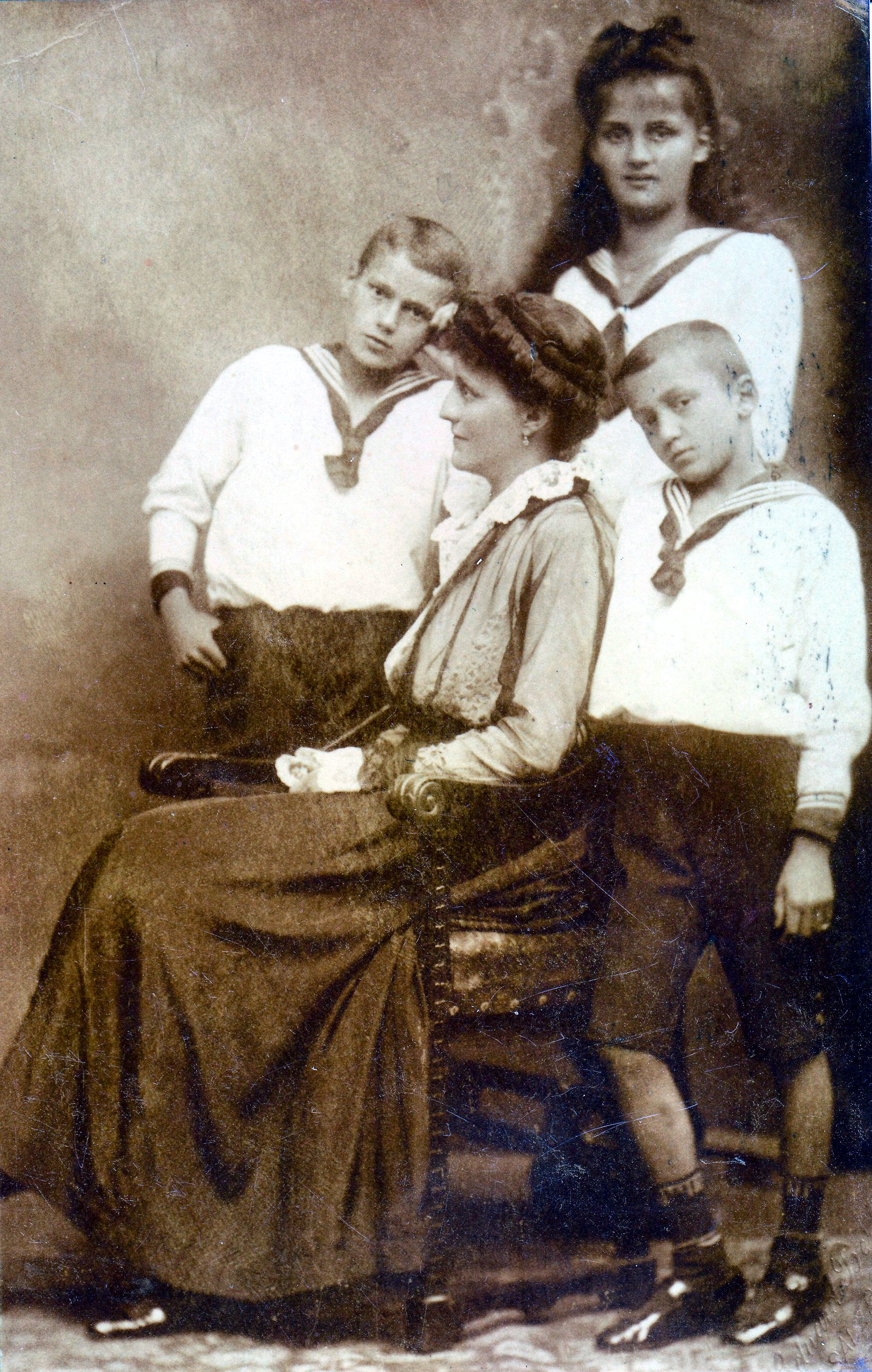 Gräfin Wassilko und ihre Kinder während ihrer Zeit in der Salzburger Residenz 1917